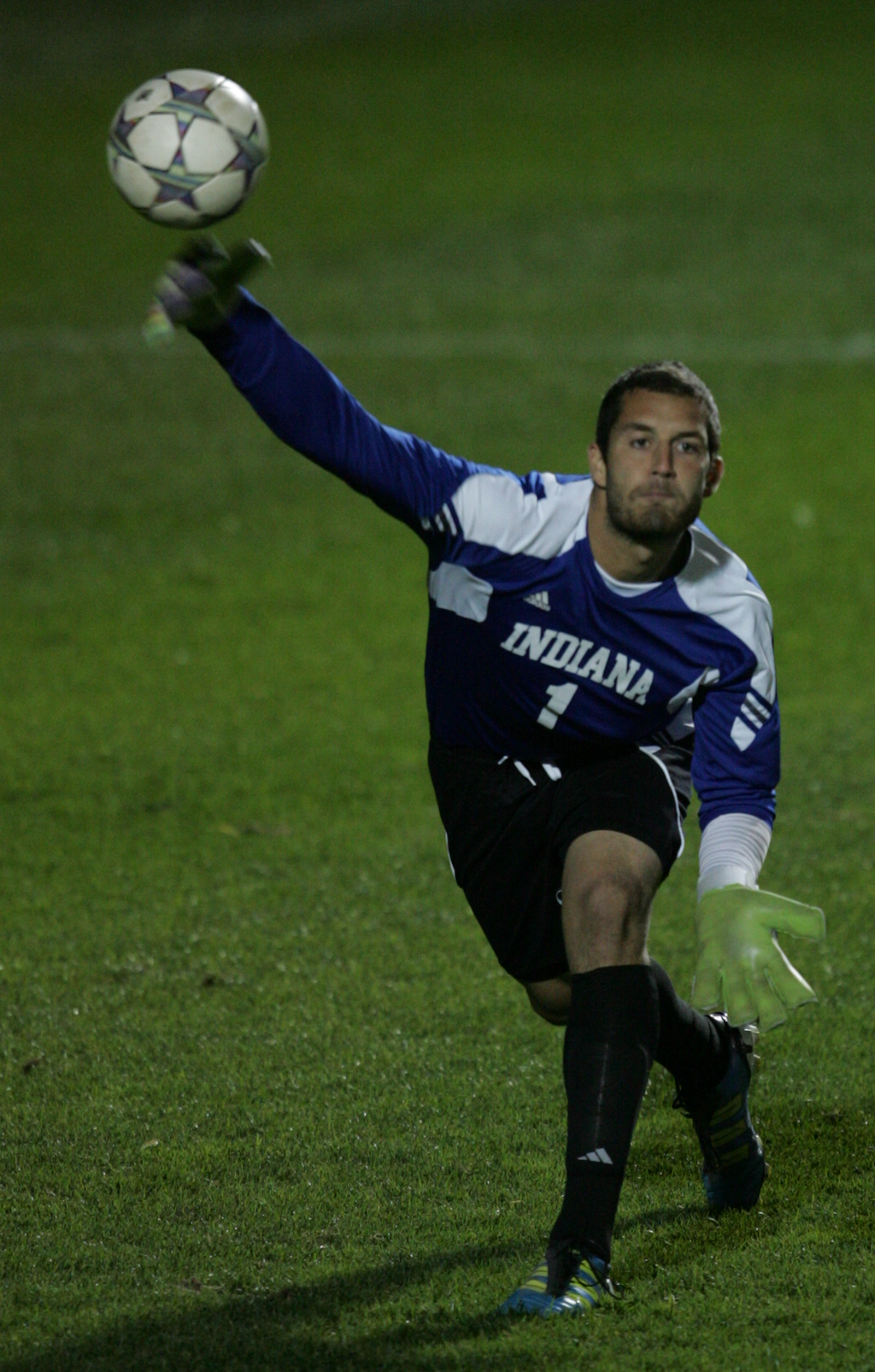 Michigan vs. Indiana